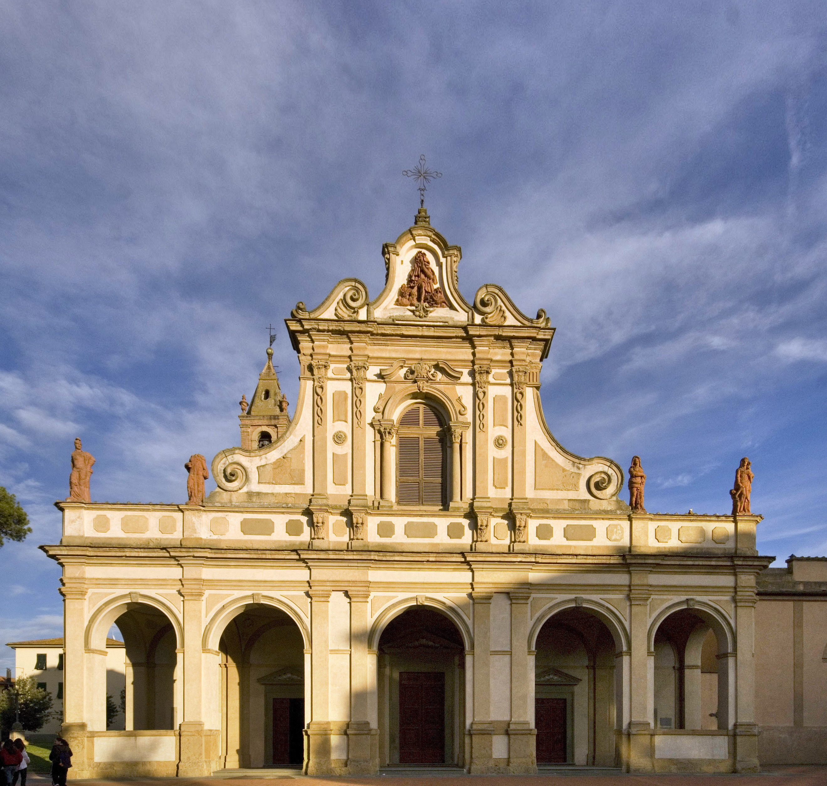 santuario di santa verdiana